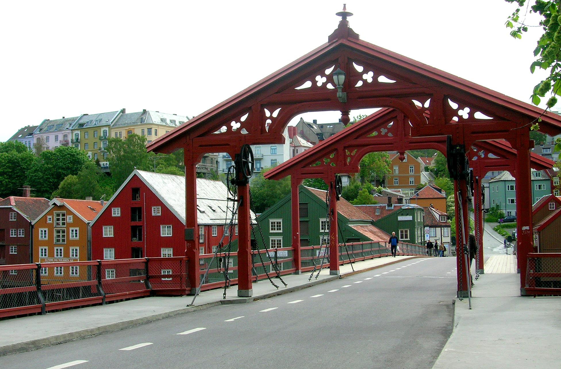 Berühmt Bréck vun Trondheim (2006)